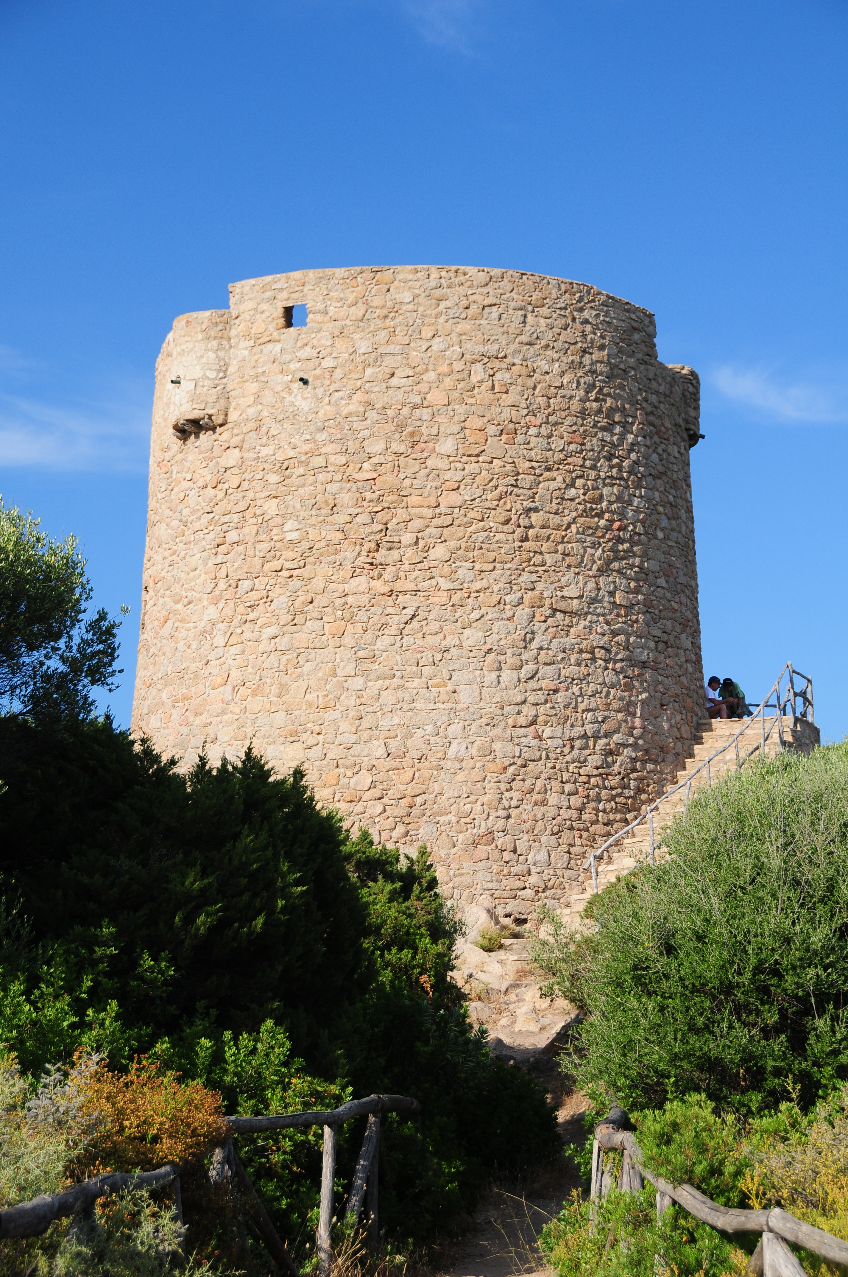 Ingresso Torre Vignola Aglientu (SS)